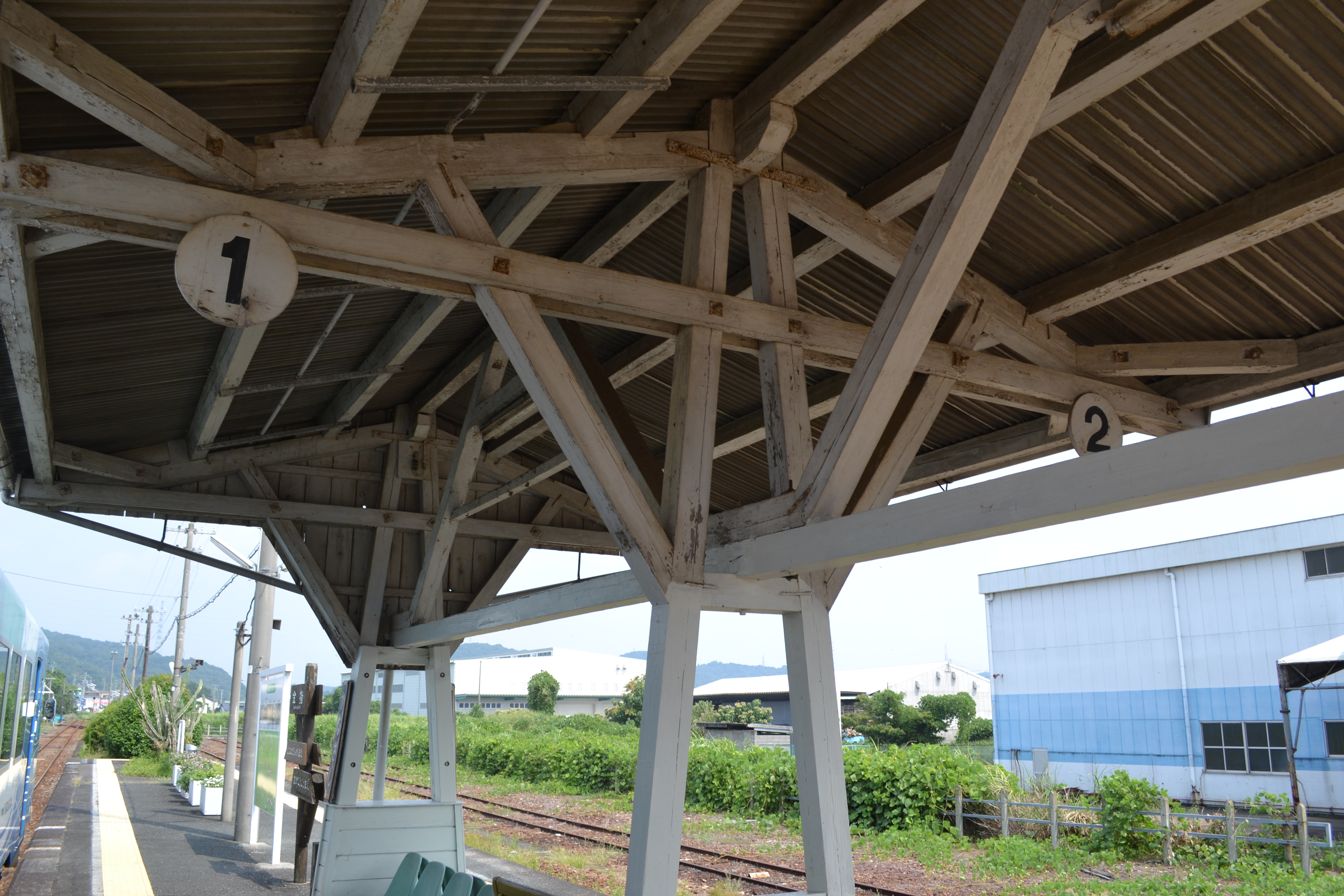 金指駅プラットホーム上屋